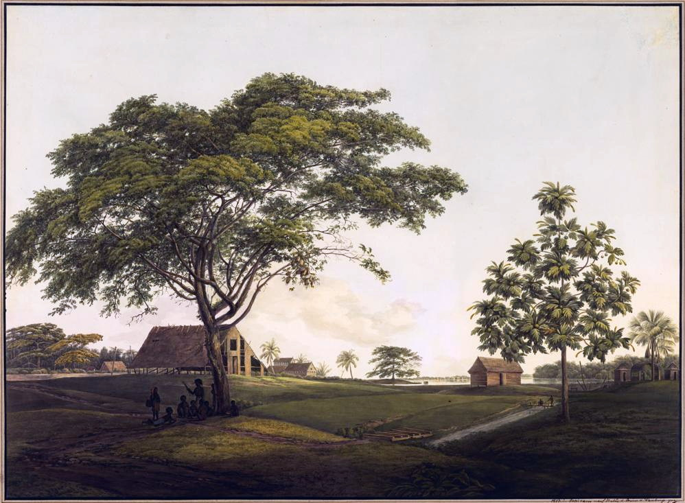 Aquarel van een landschap met bomen nabij Plantage Alkmaar in Suriname, geschilderd door Louise van Panhuys tijdens haar verblijf in Suriname als echtgenote van een plantagehouder (1811-1816). Collectie Universiteitsbibliotheek Frankfurt am Main.